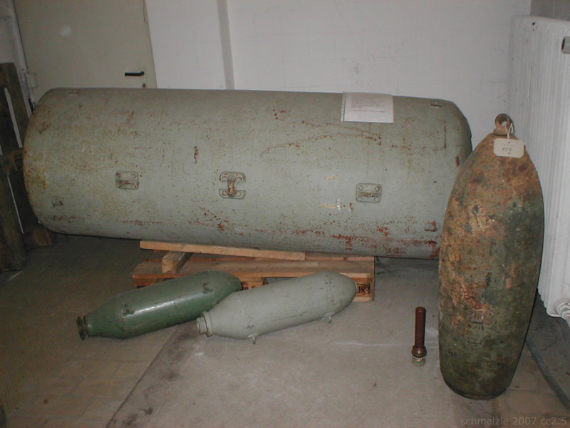 Blindgänger von Luftangriffen auf Heilbronn während des Zweiten Weltkriegs. Die große Bombe ist eine britische 4000-Pfund-Luftmine, die jedoch nachträglich überstrichen wurde, so dass keine Originalbeschriftung mehr erkenntlich ist.